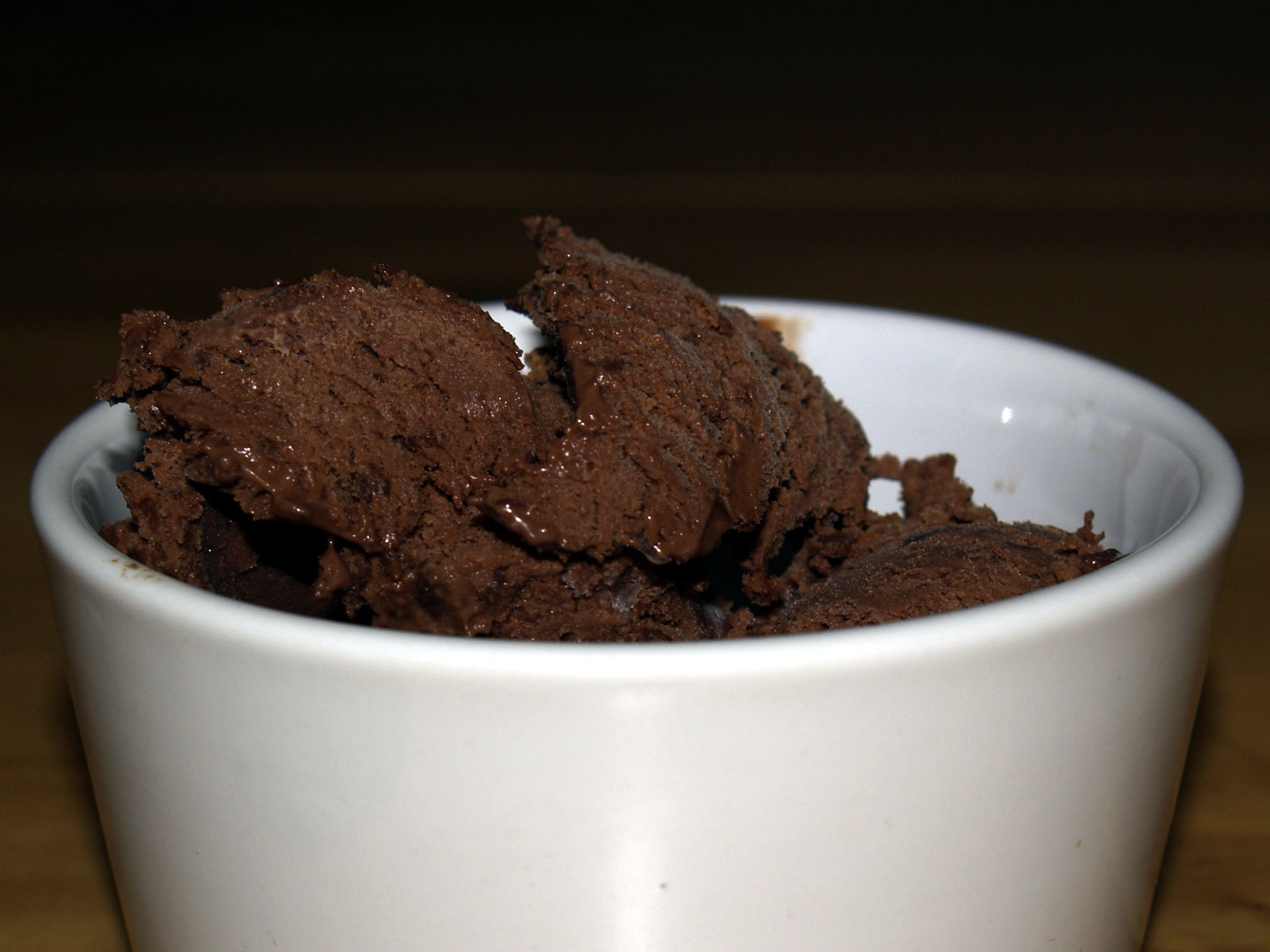 Chokoladeis